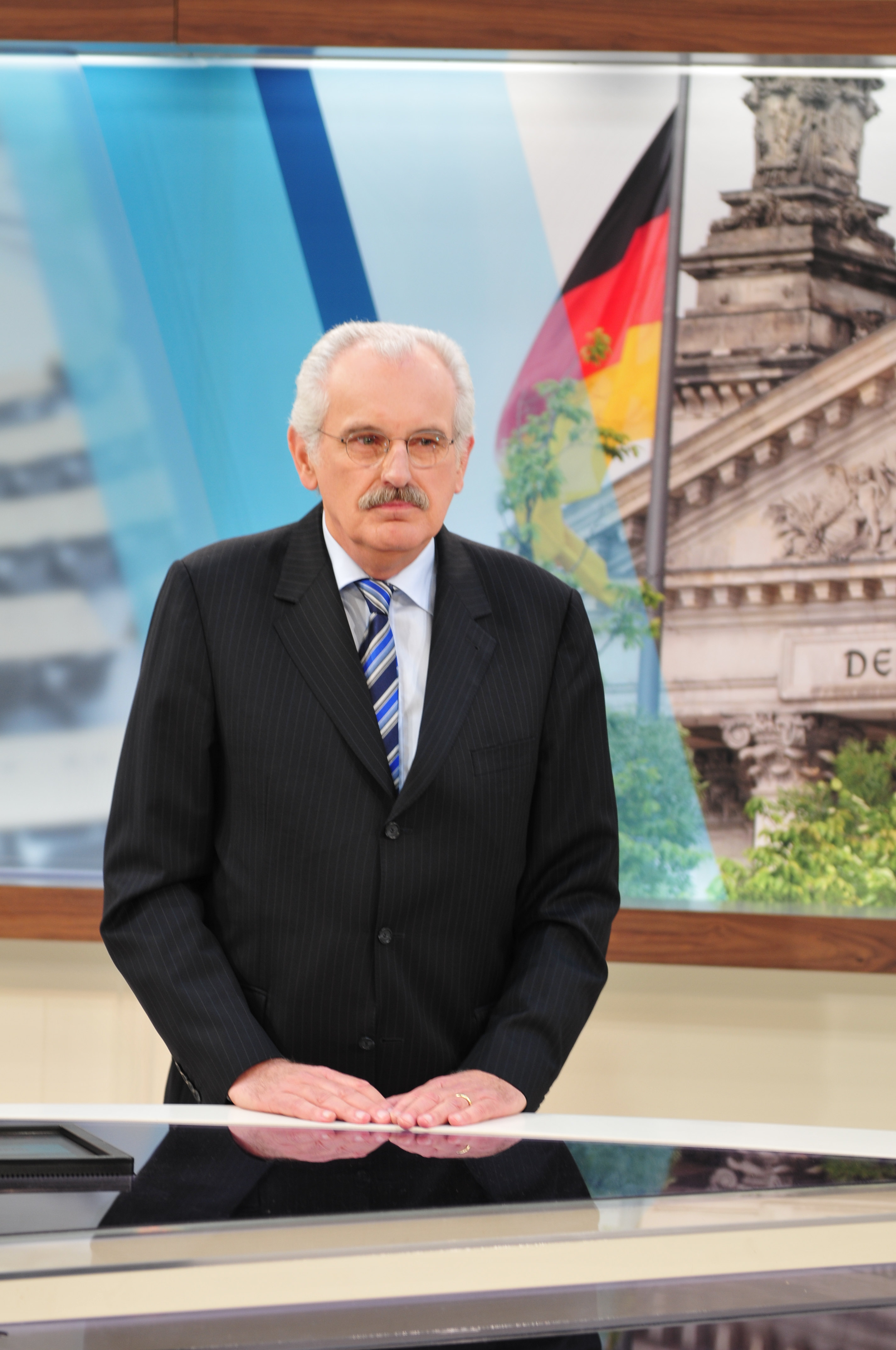 Berichterstattung zur Bundestagswahl aus dem Hauptstadtstudio Berlin; Pressetermin am 20. Sept. 2013